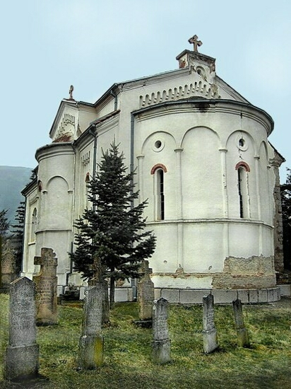 Црква Манастира Дивљане